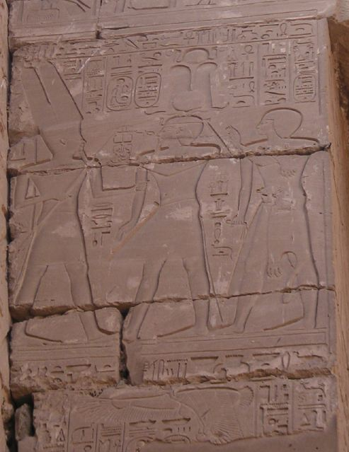 Relief au nom de Sheshonq Ier et de son fils, le grand prêtre d'Amon, Ioupout - XXIIe dynastie égyptienne - Karnak, temple d'Amon-Rê